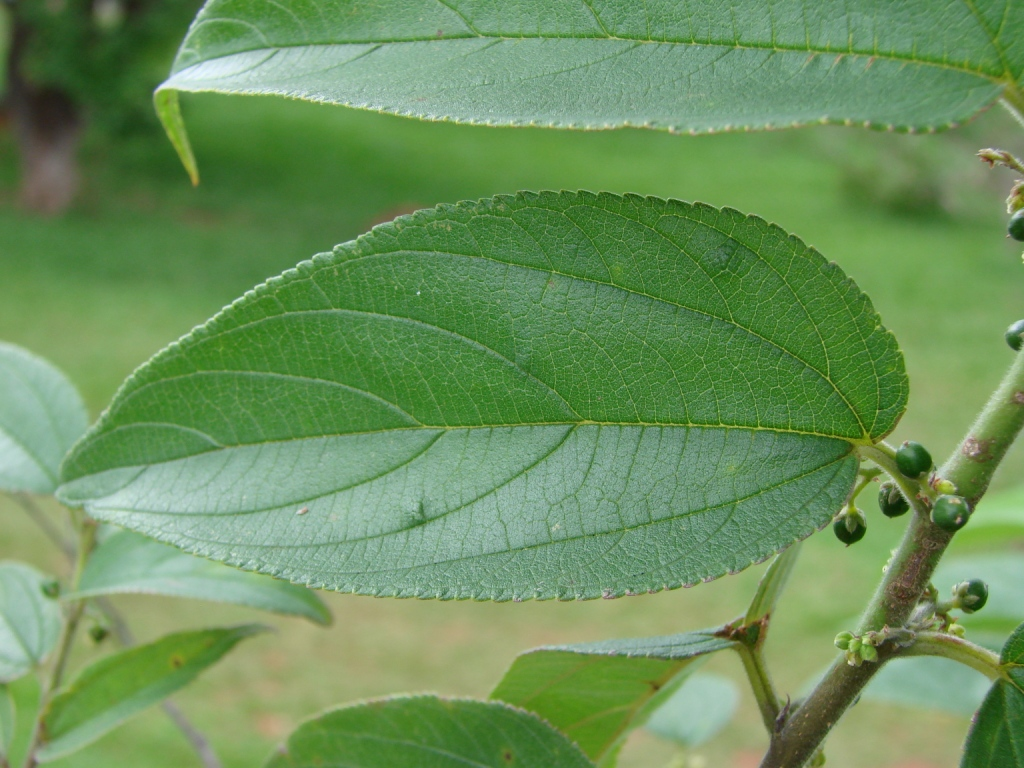 Trema micrantha - CANNABACEAE Parque Olhos D' Água - Brasília - Distrito Federal - Brasil.